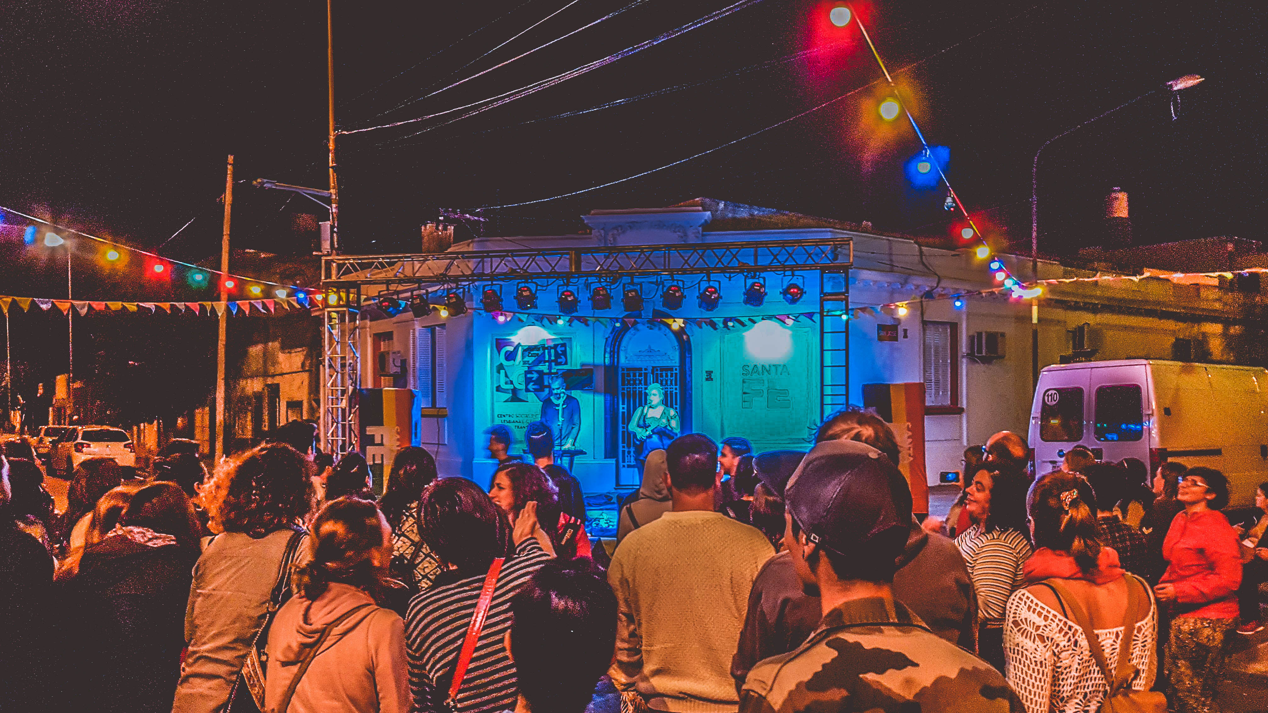 En homenaje a Claudia Pía Baudracco, el 18 de marzo del 2014 la legislatura de la ciudad de Buenos Aires sancionó una ley que instituye ese día como una jornada de promoción de los derechos de las Personas Trans